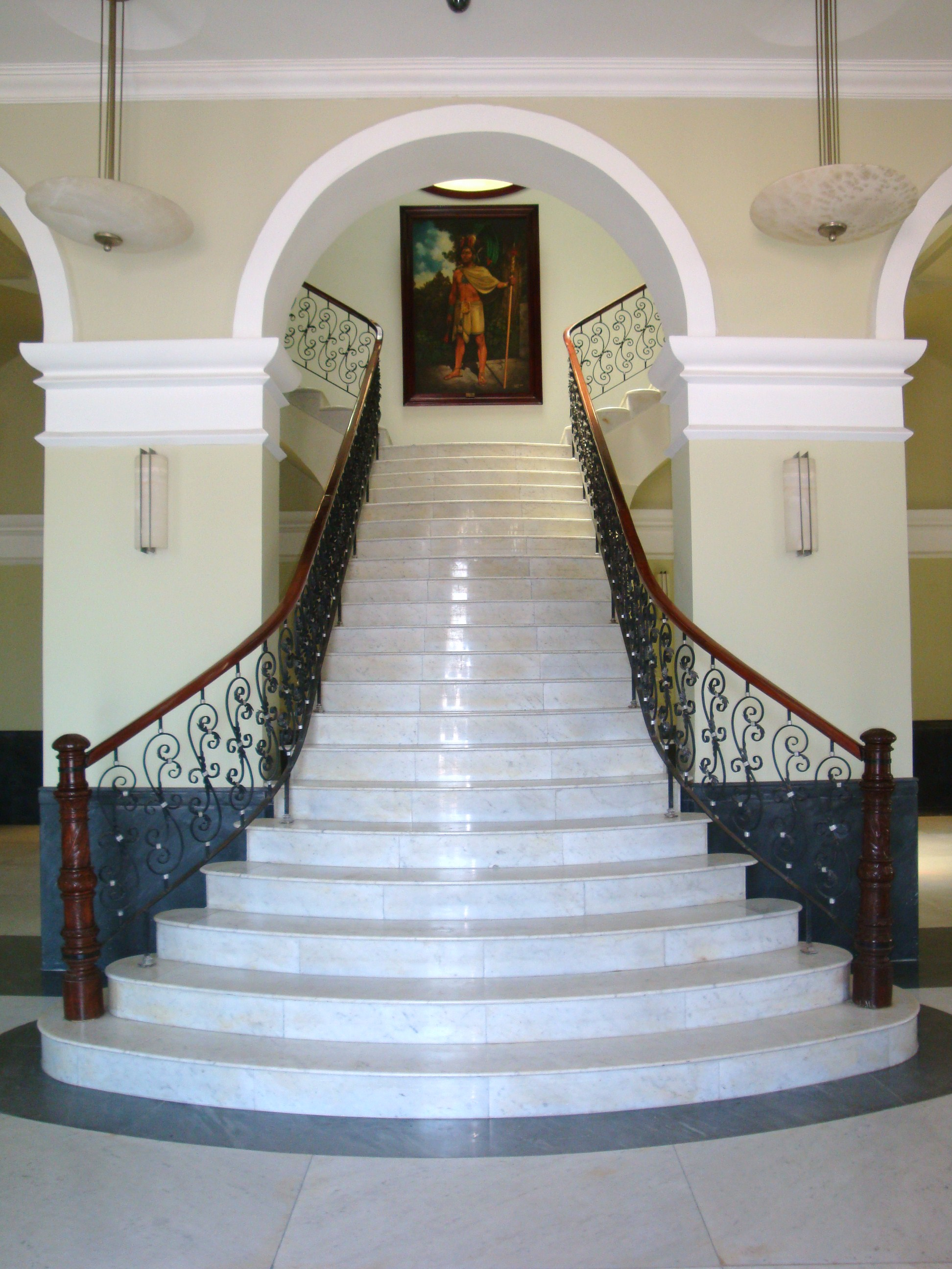 Escalera principal de el Palacio de Gobierno de Tabasco. Villahermosa, Tabasco, México.